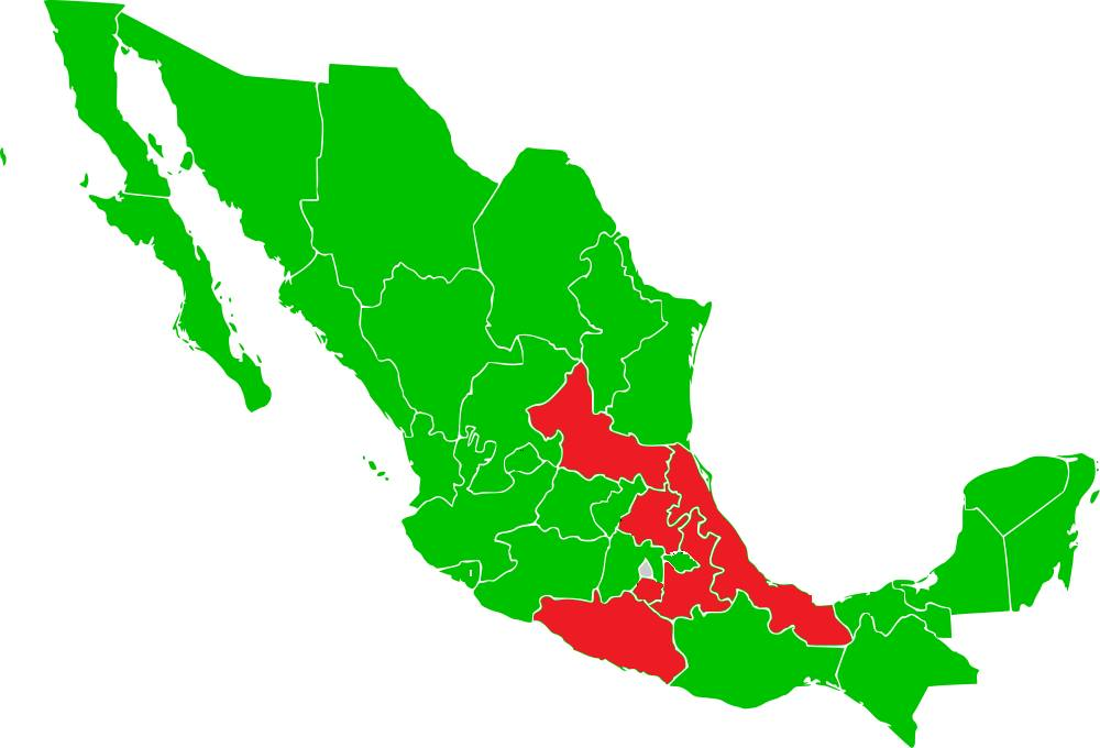 納瓦族群分布